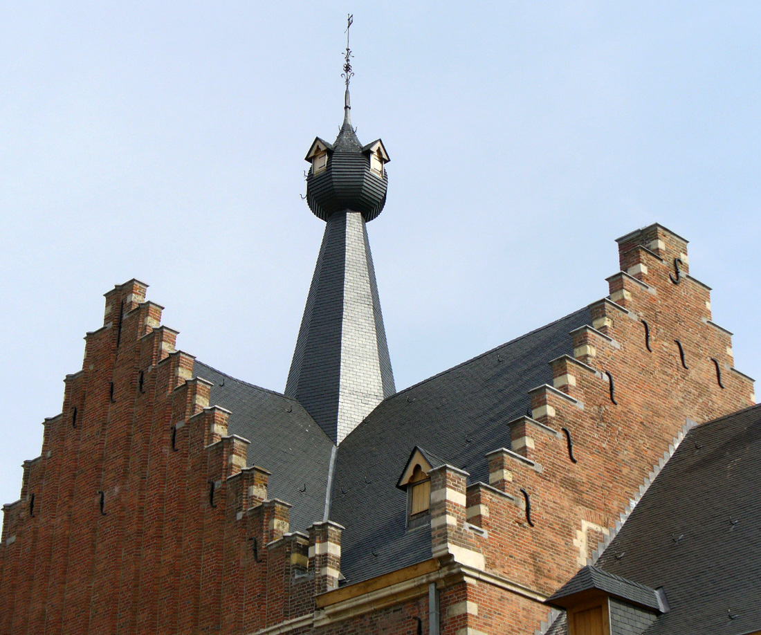 Abdijsite Herkenrode in Hasselt. Laatgotisch poortgebouw uit 1531 met uivormig torentje.